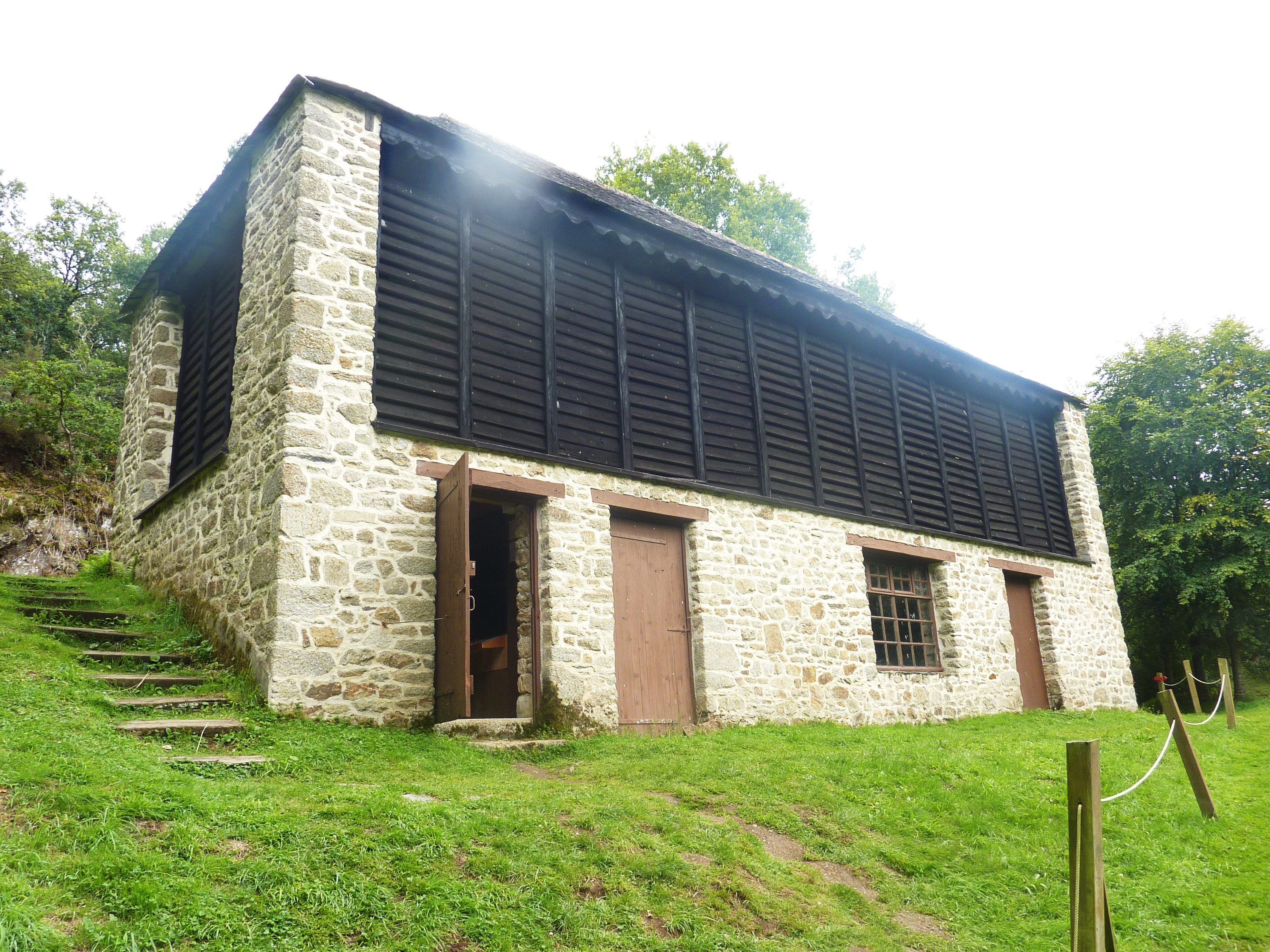 Moulins de Kerouat : l'ancienne tannerie Abgrall (siuée au bourg de Lampaul-Guimiliau, elle a été remontée sur le site des Moulins de Kerouat en 1986)